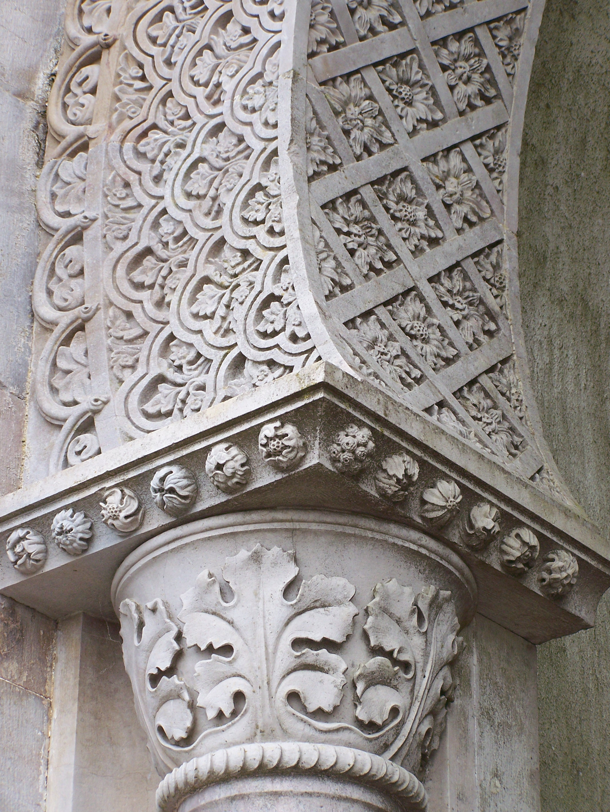 Palácio Nacional da Pena, Sintra, Portugal.